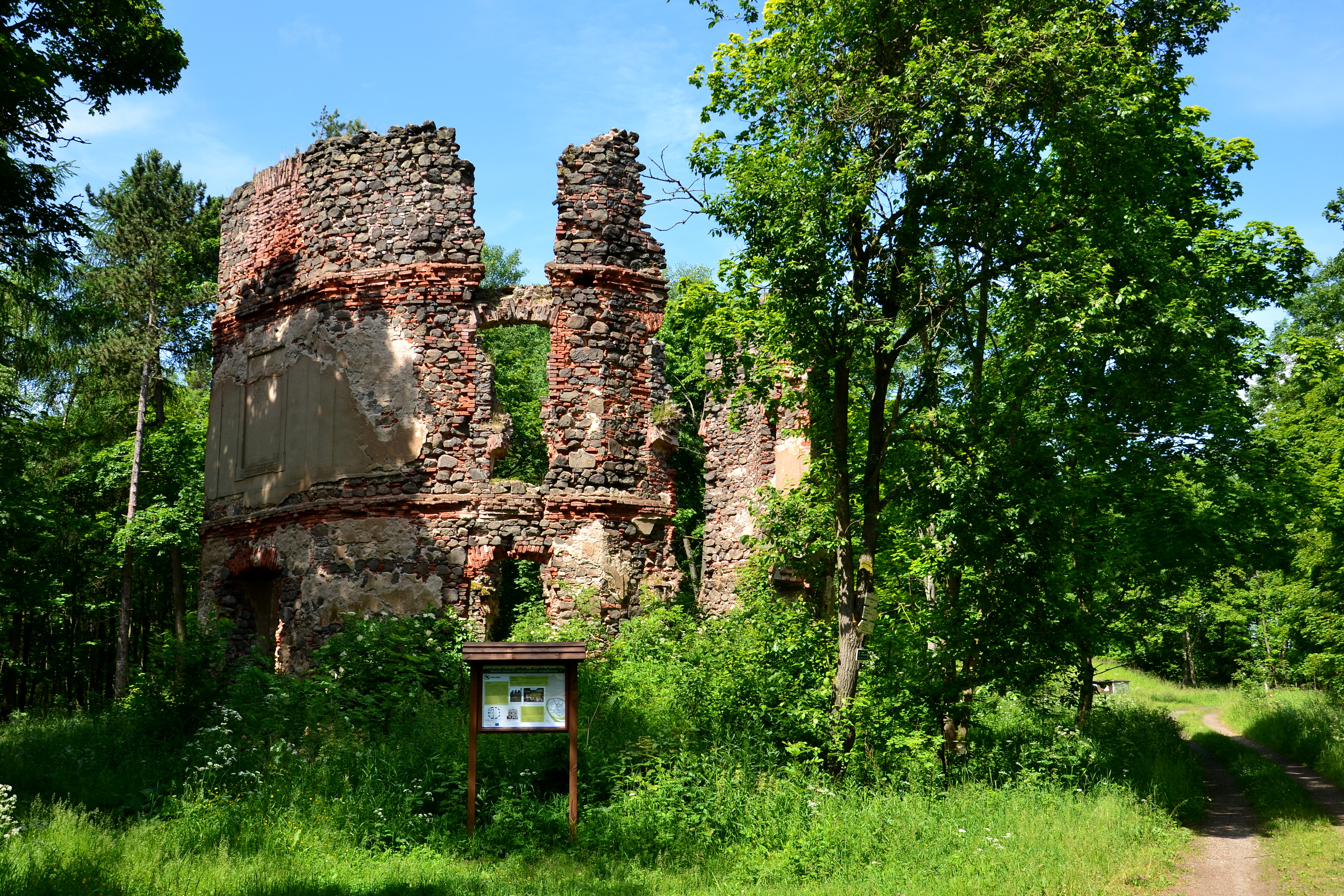 Lovecký zámeček Mořičov, Mořičov, pohled z východu